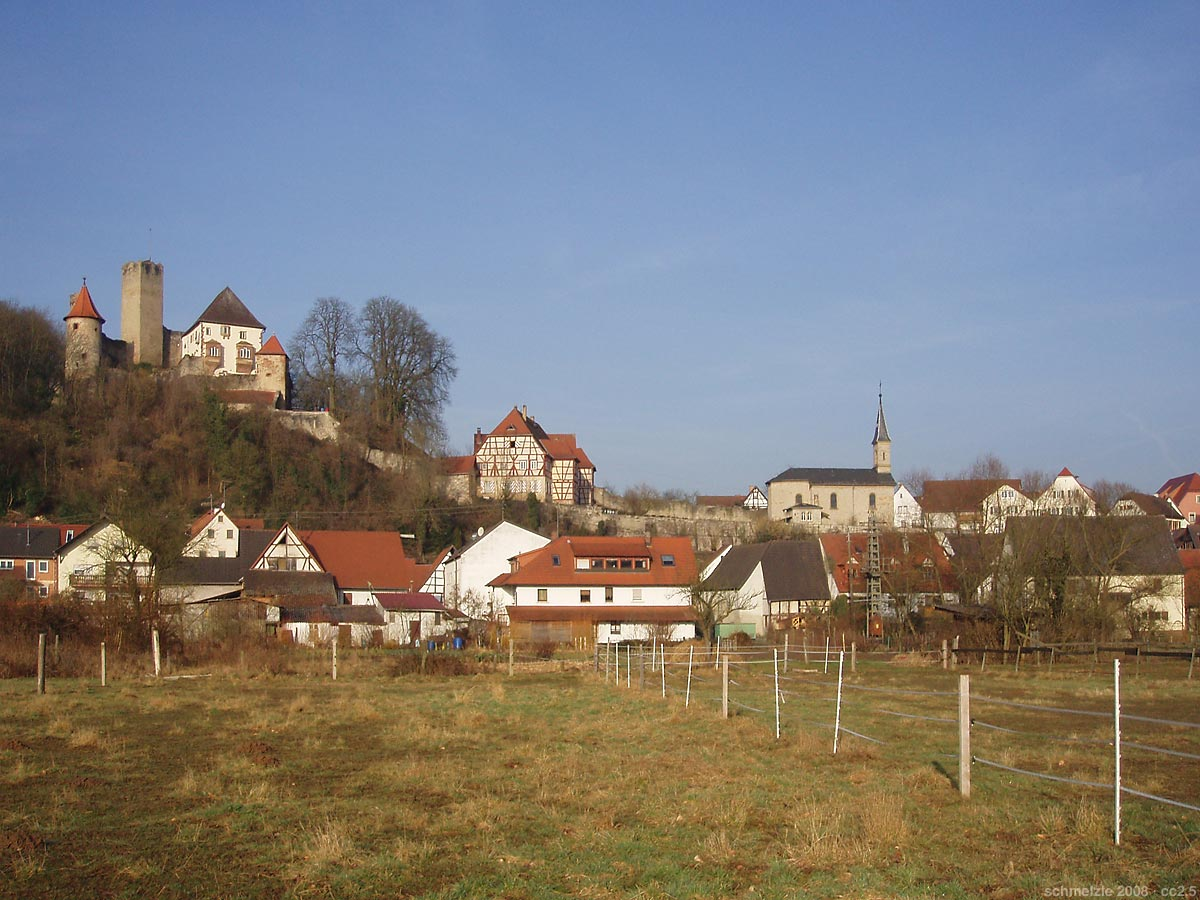 Neidenstein, Blick von Osten auf die Veste neidenstein und den nördlichen Bereich des Altortes